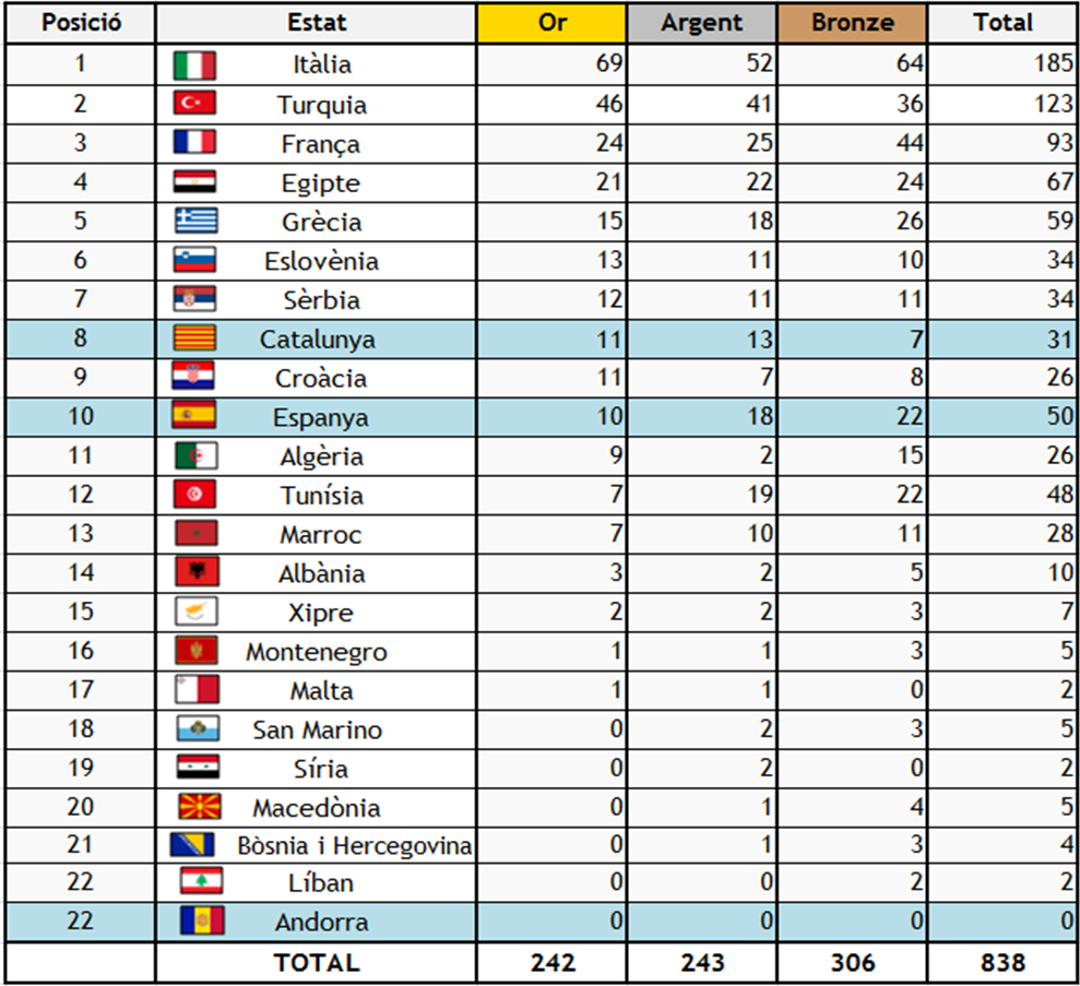 Medaller dels Jocs del Mediterrani de 2013,, celebrats a Mersin (Turquia), amb Catalunya i Espanya per separat.